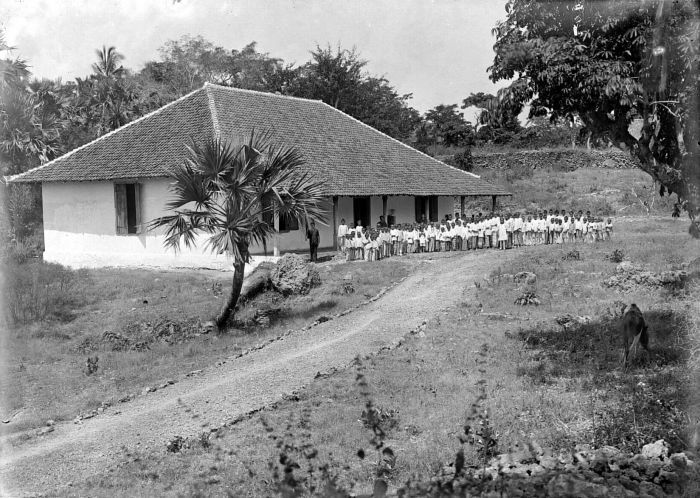 Negatief. Inlandse school te Termanu op het eiland Roti, Indonesië